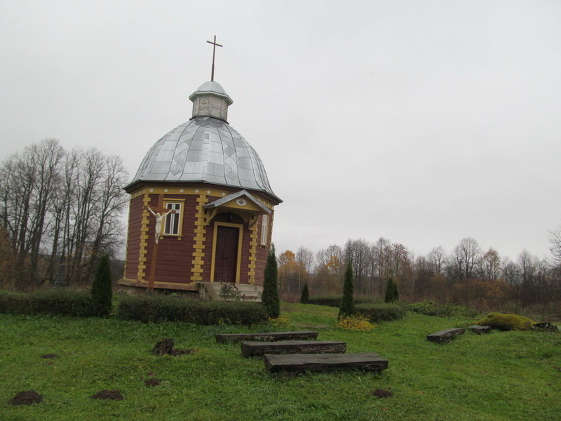 Гняздзілава. Капліца-пахавальня